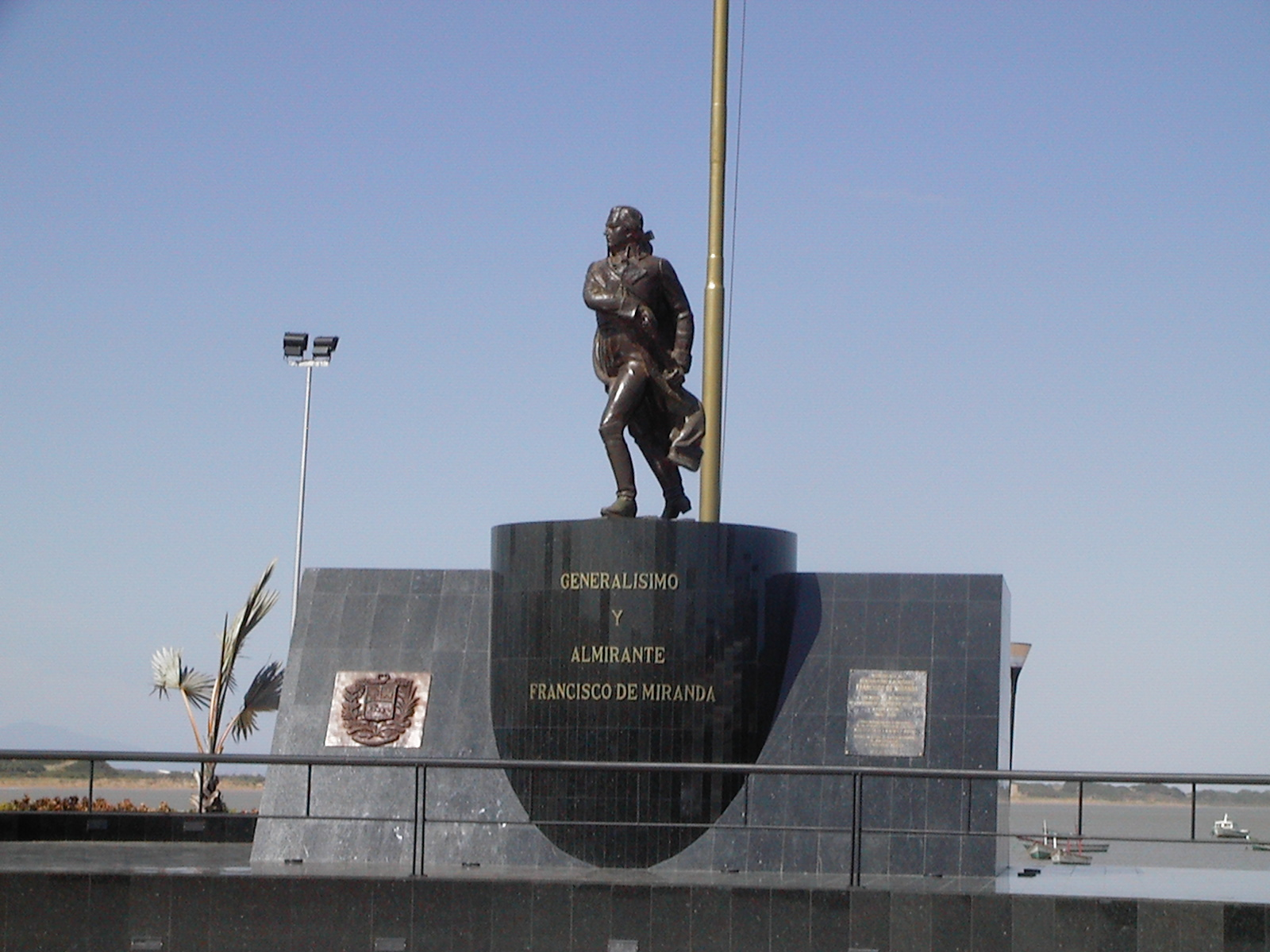 Monumeto a Miranda y a la Bandera